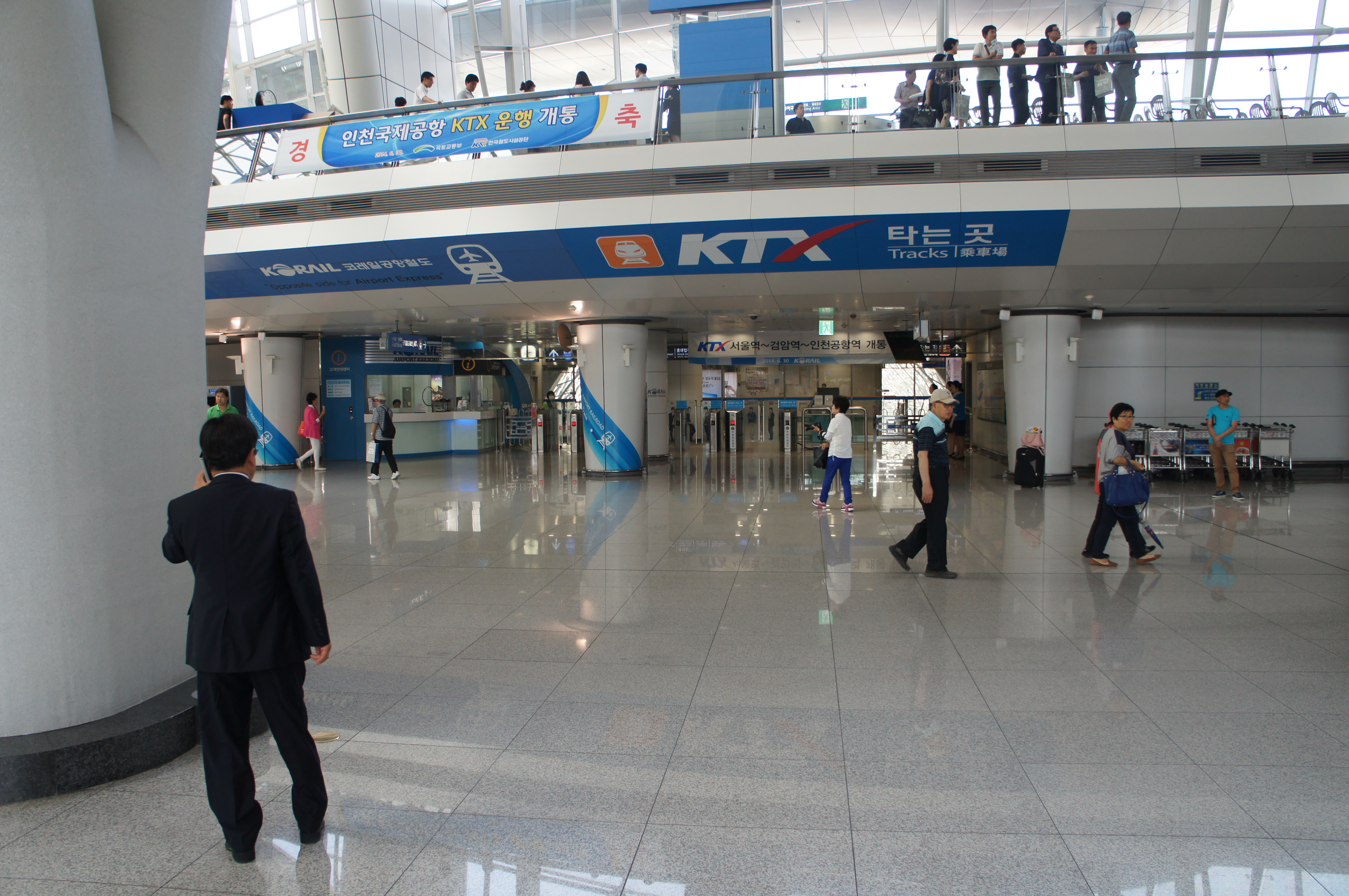 인천국제공항역 대합실 (2)